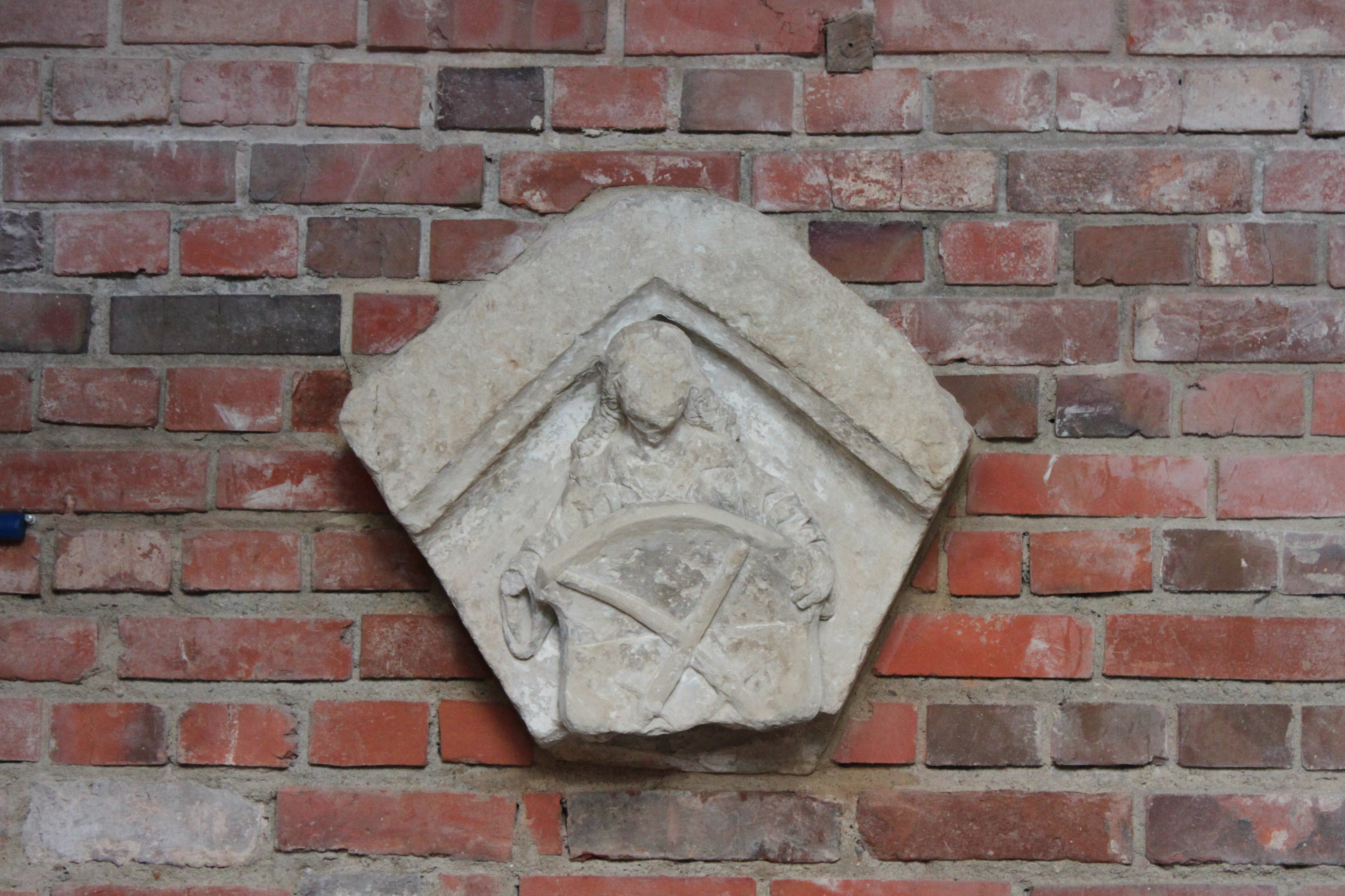 vermutlich Euphemia von Oels mit den Kurschwertern